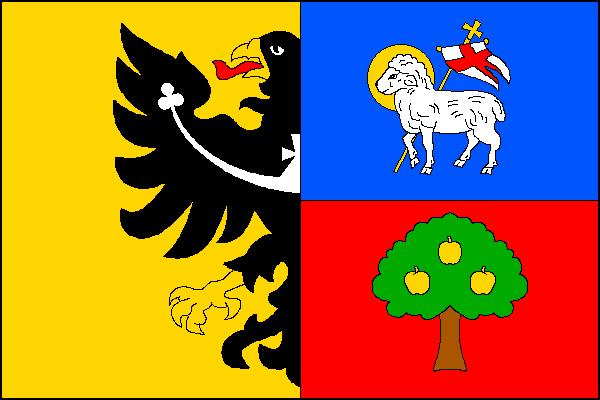 Vlajka obce Jablunkov